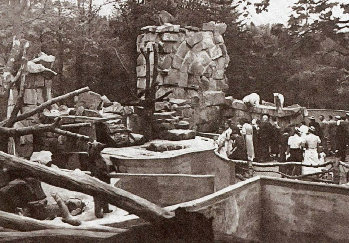 Довоенный зоопарк в Кёнигсберге (Калиниград)